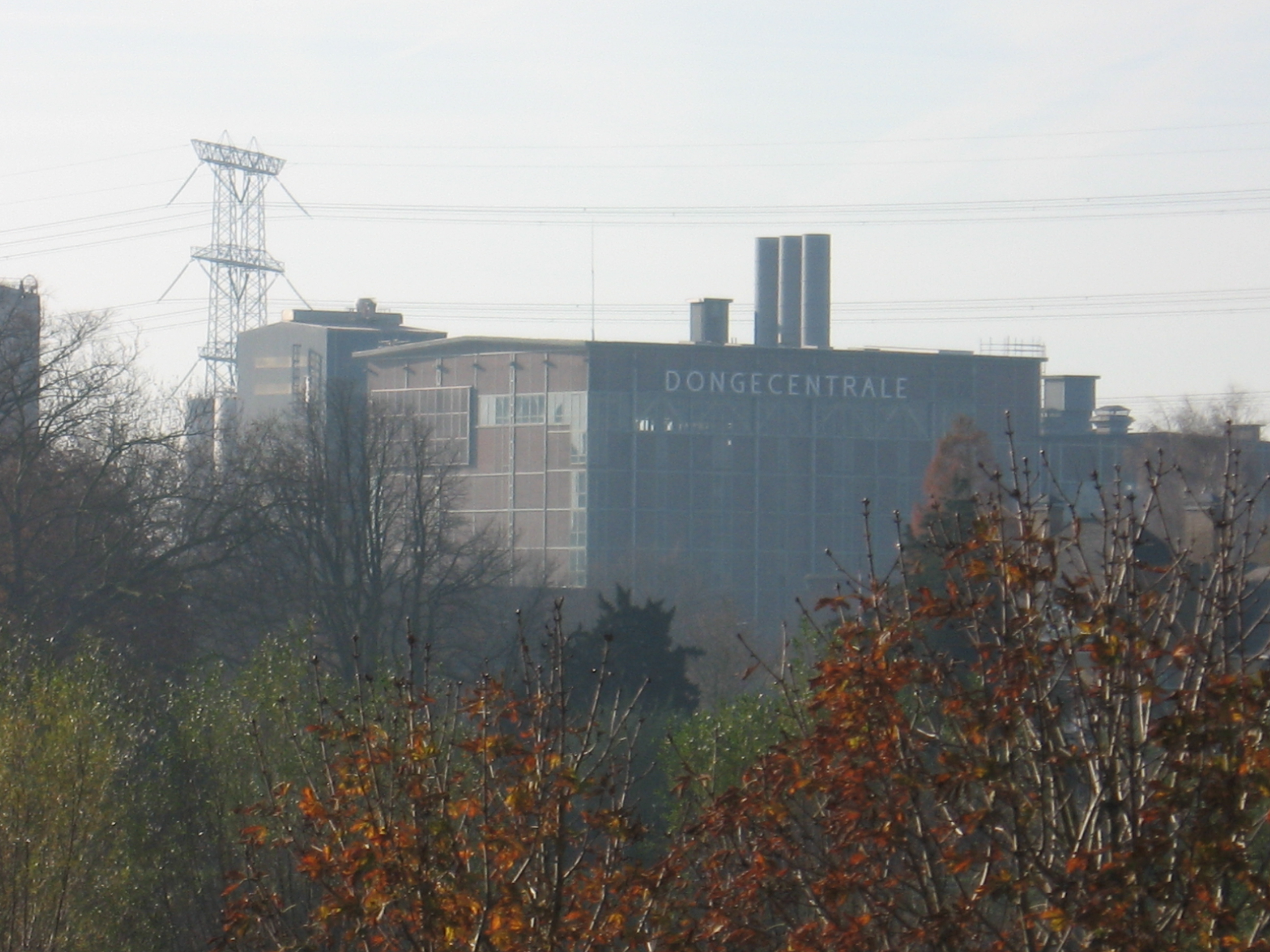 Dongecentrale